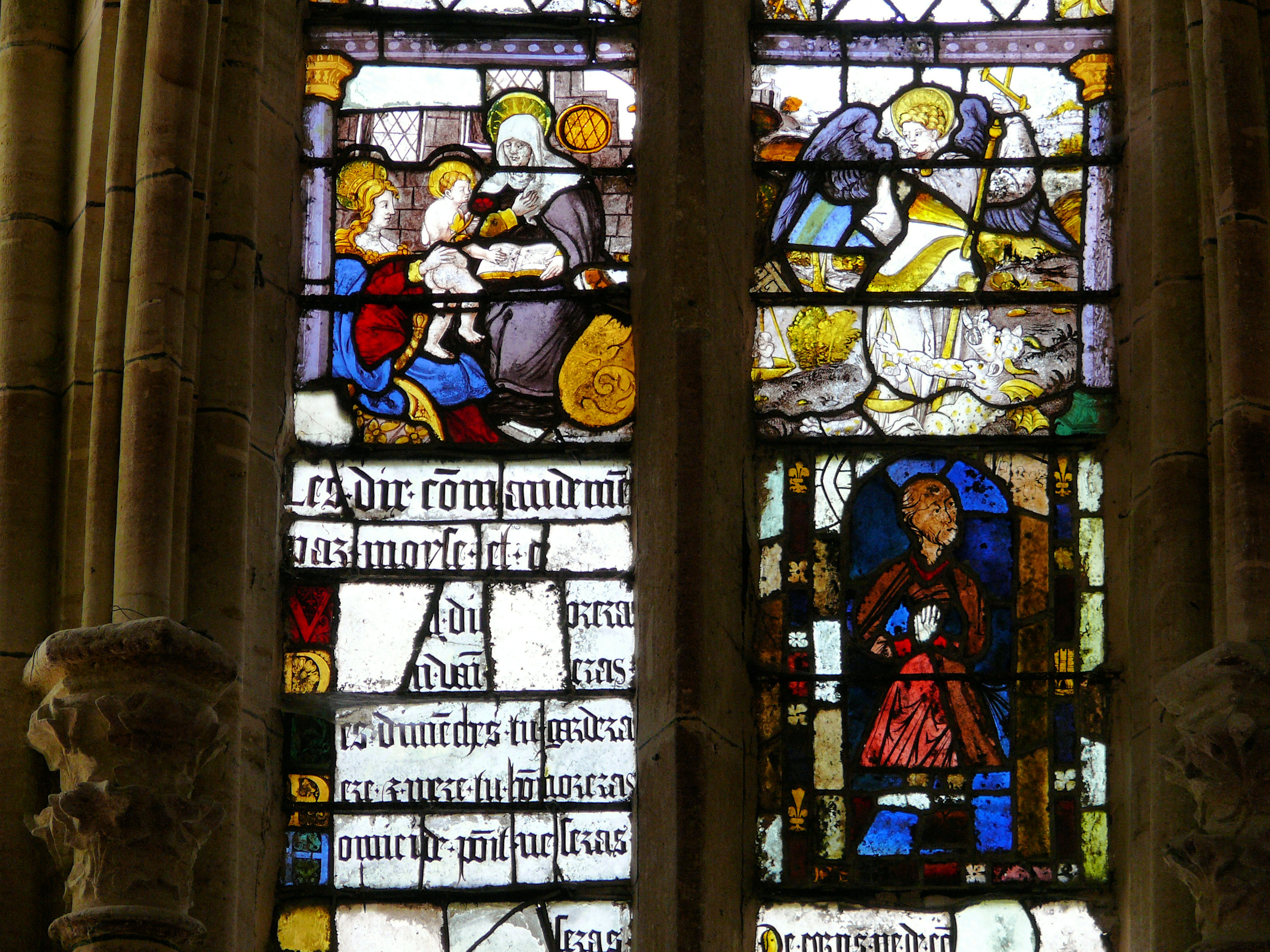 Église Saint-Amand de Saint-Amand-sur-Fion - Restes de vitraux anciens dans une chapelle de croisillon du transept